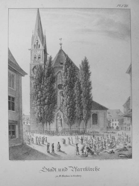 Stadt und Pfarrkirche zu St. Stephan in Constanz, Lithographie von J.J. Ruegg, Konstanz, nach J. Bergmann